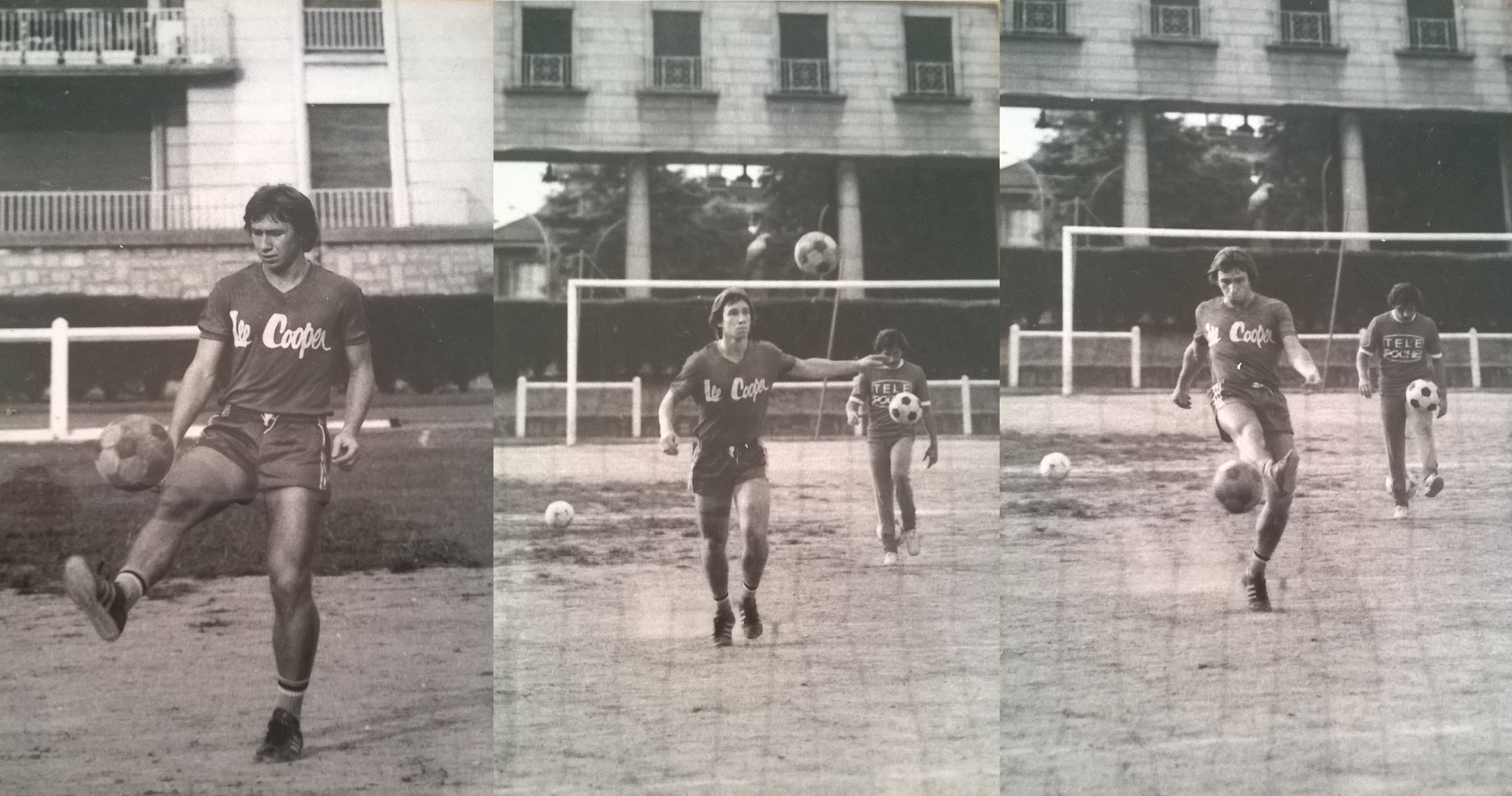 Laurent Bouchez